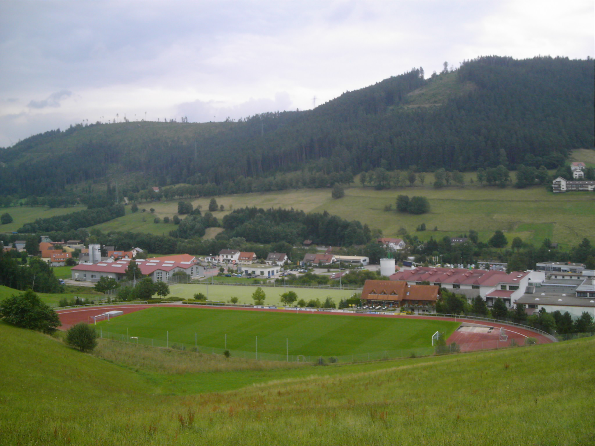 Baiersbronn (Schwarzwald) mit Einkaufscenter und Sportplatz. Eigenes Bild. Foto: A.Lehr im August 2006